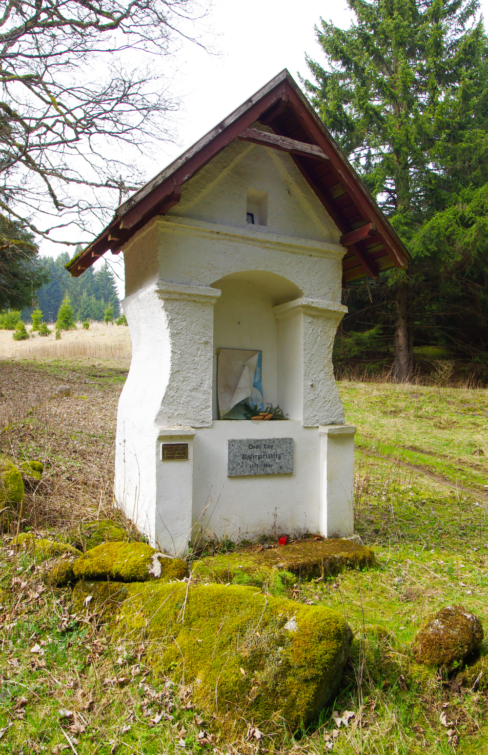 Dolní Lazy, kaplička na jižním konci zaniklé obce směrem na Horní Lazy (dnes Lazy), Slavkovský les; více